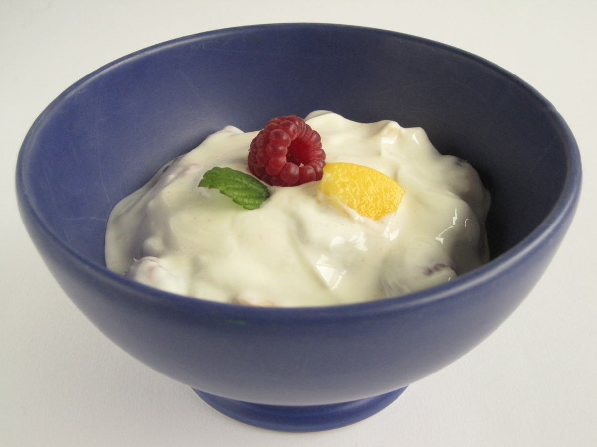 Joghurt mit heimischem Obst